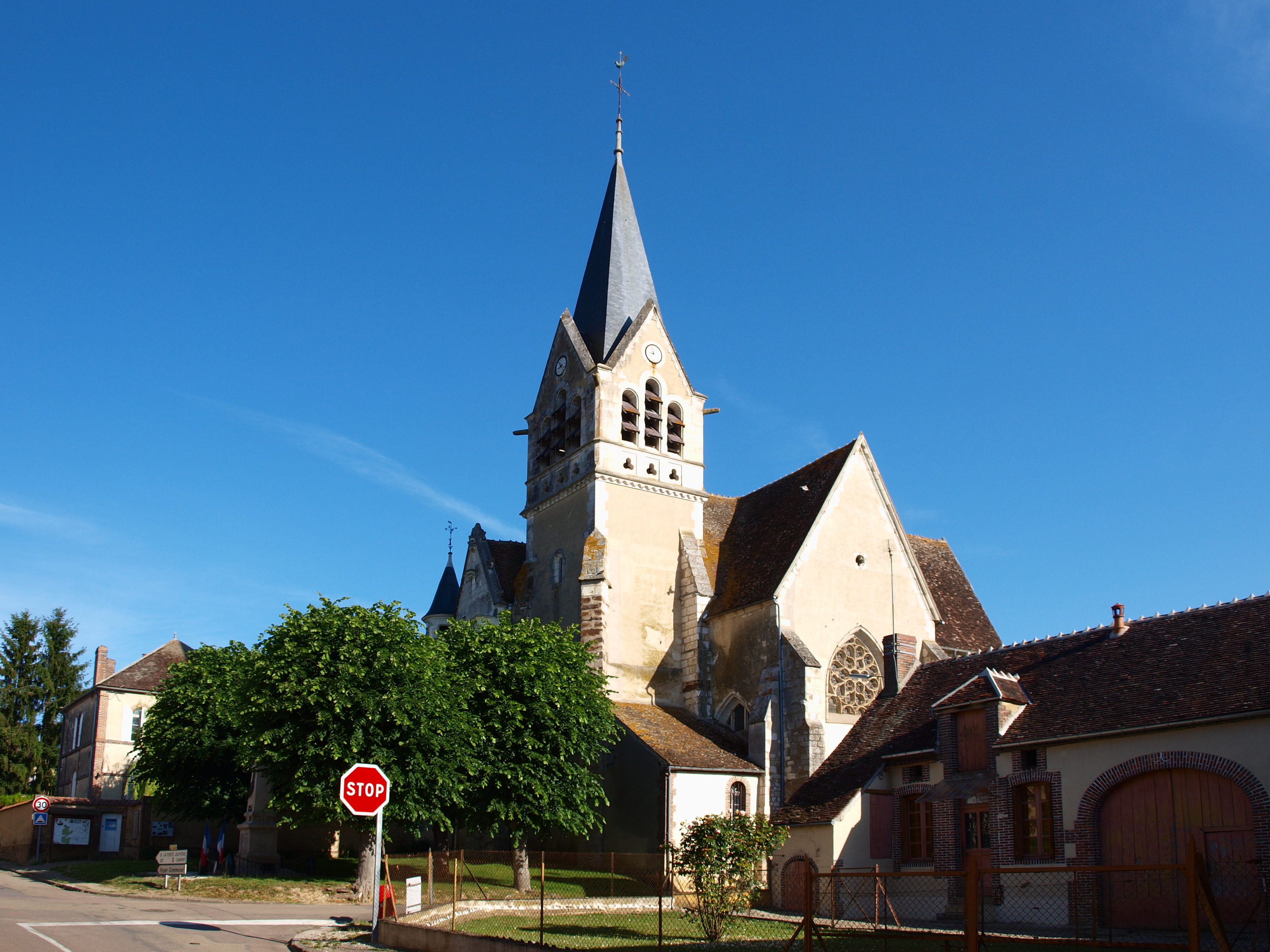 Villiers-sur-Tholon (Yonne, France)